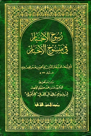 دراسة وتحقيق الدكتور حسن محمد مقبولي الأهدل